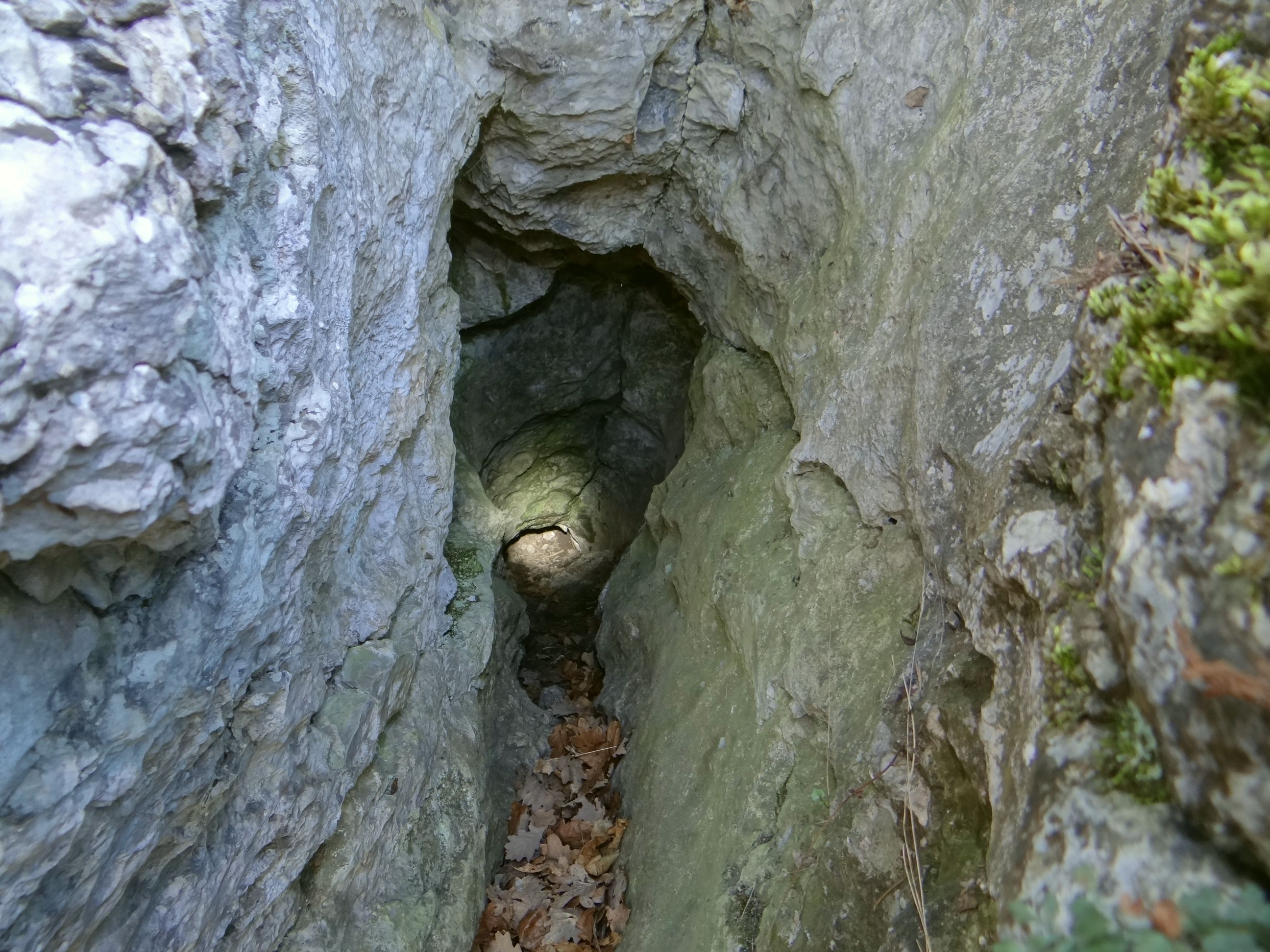 Jaskinia